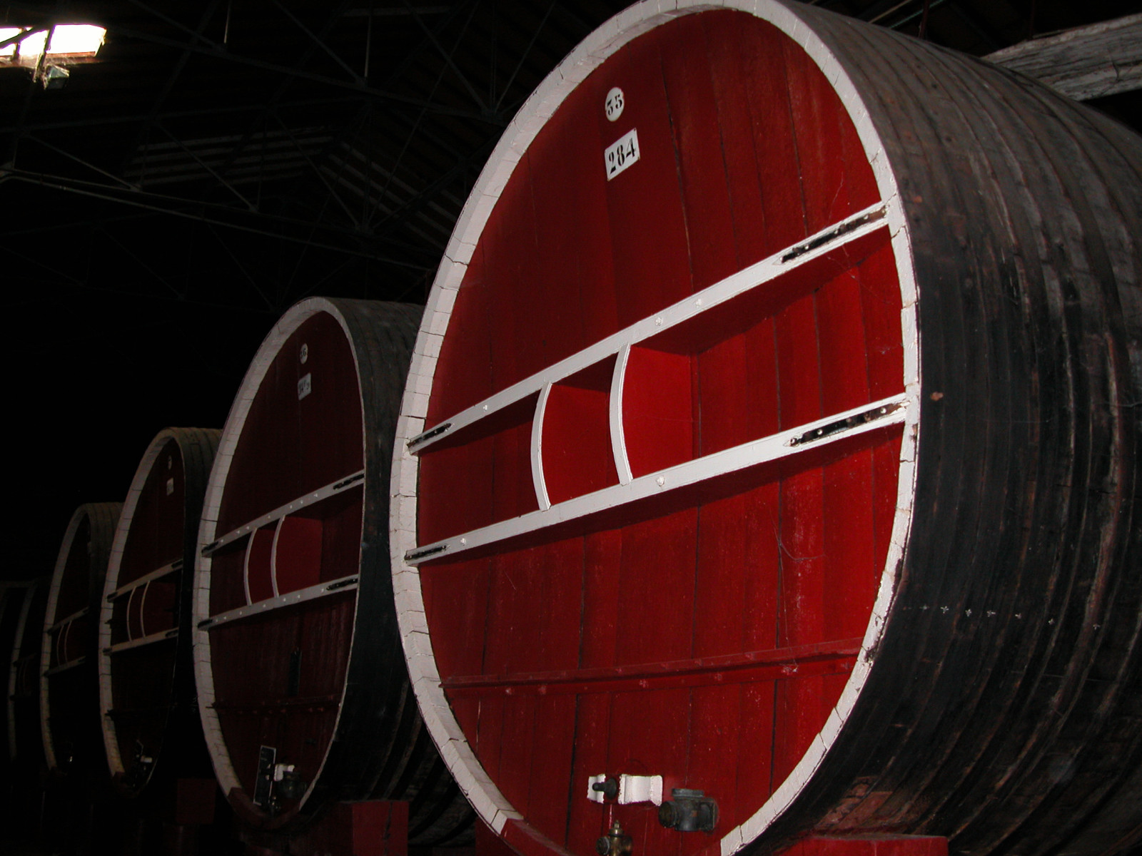 Foudres centenaires de la cave coopérative "Les Vignerons libres" à MARAUSSAN (Hérault)